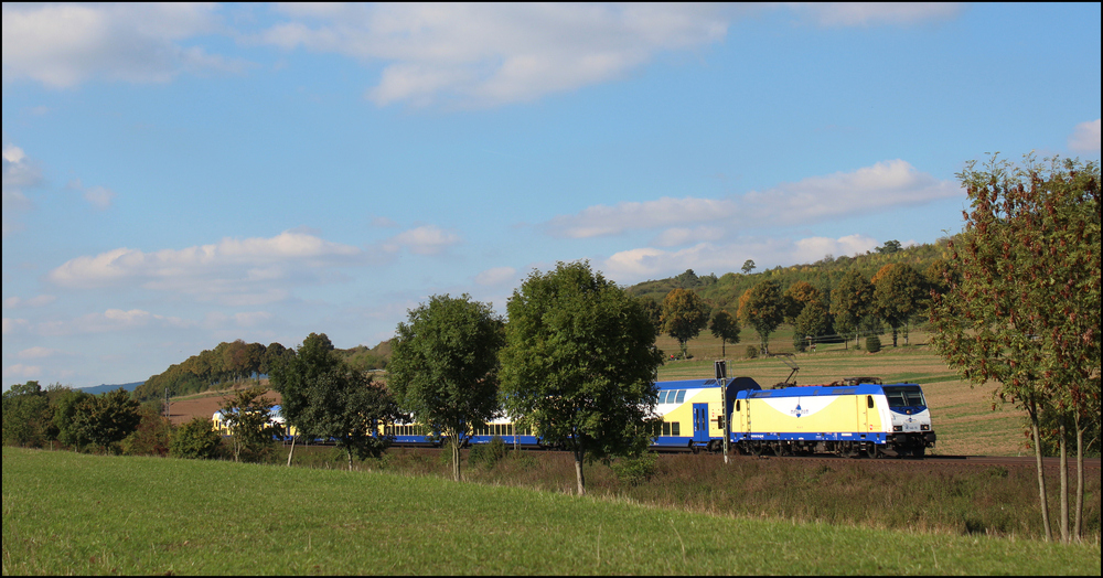 Metronom Zug auf dem Weg nach Göttingen